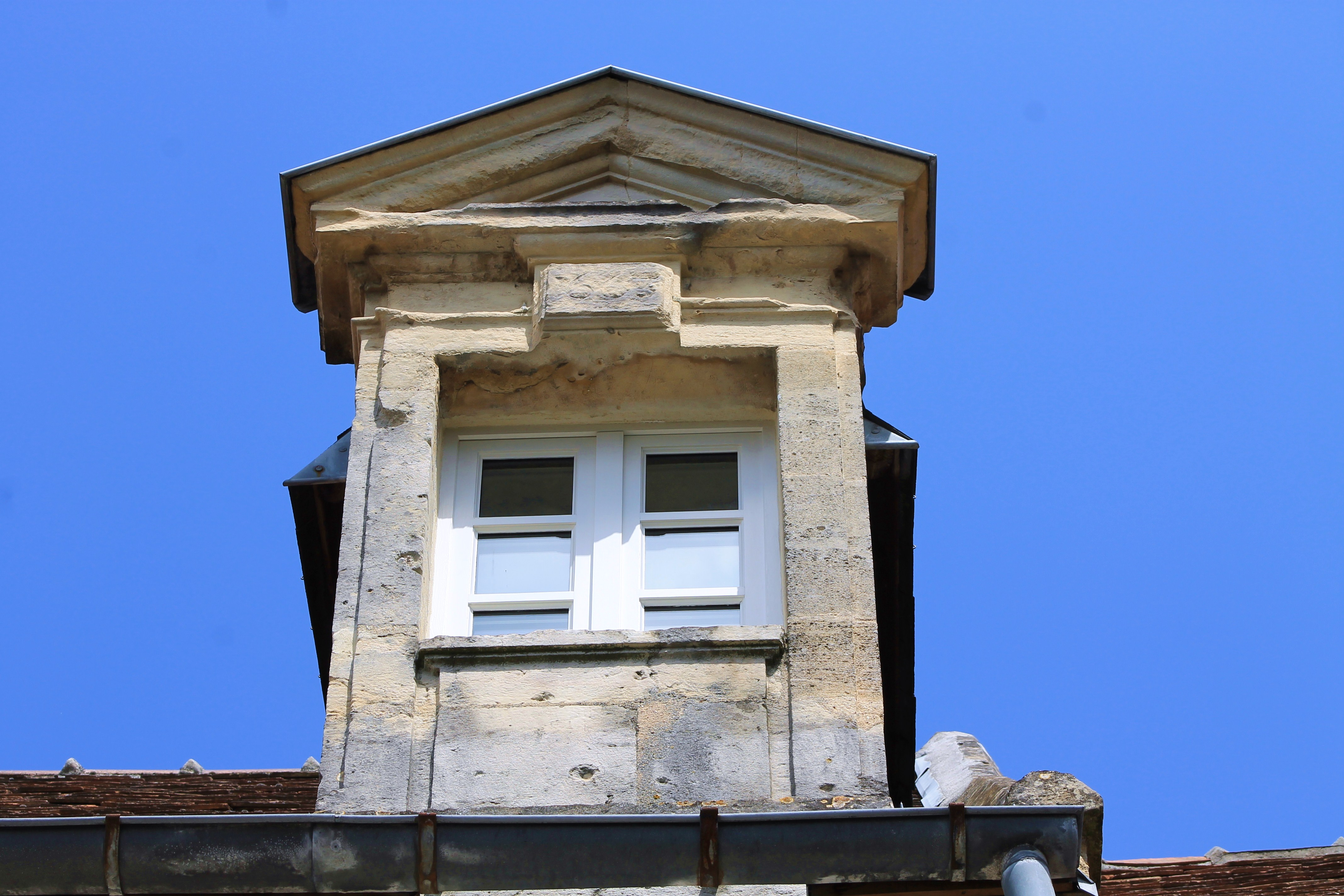 Lucarne datée 1663 au 10 rue Bicoquet à Caen (Calvados)